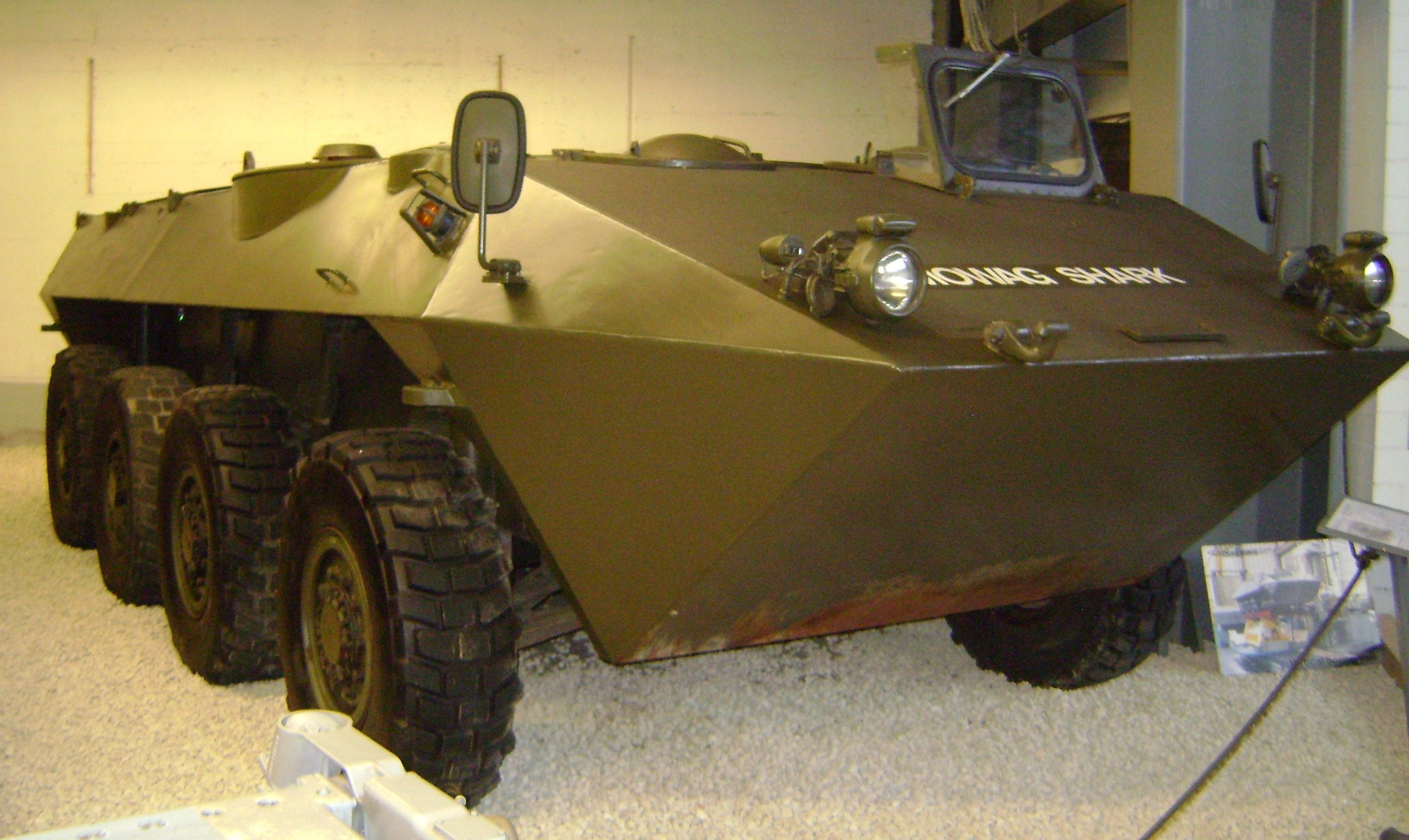 MOWAG Shark front